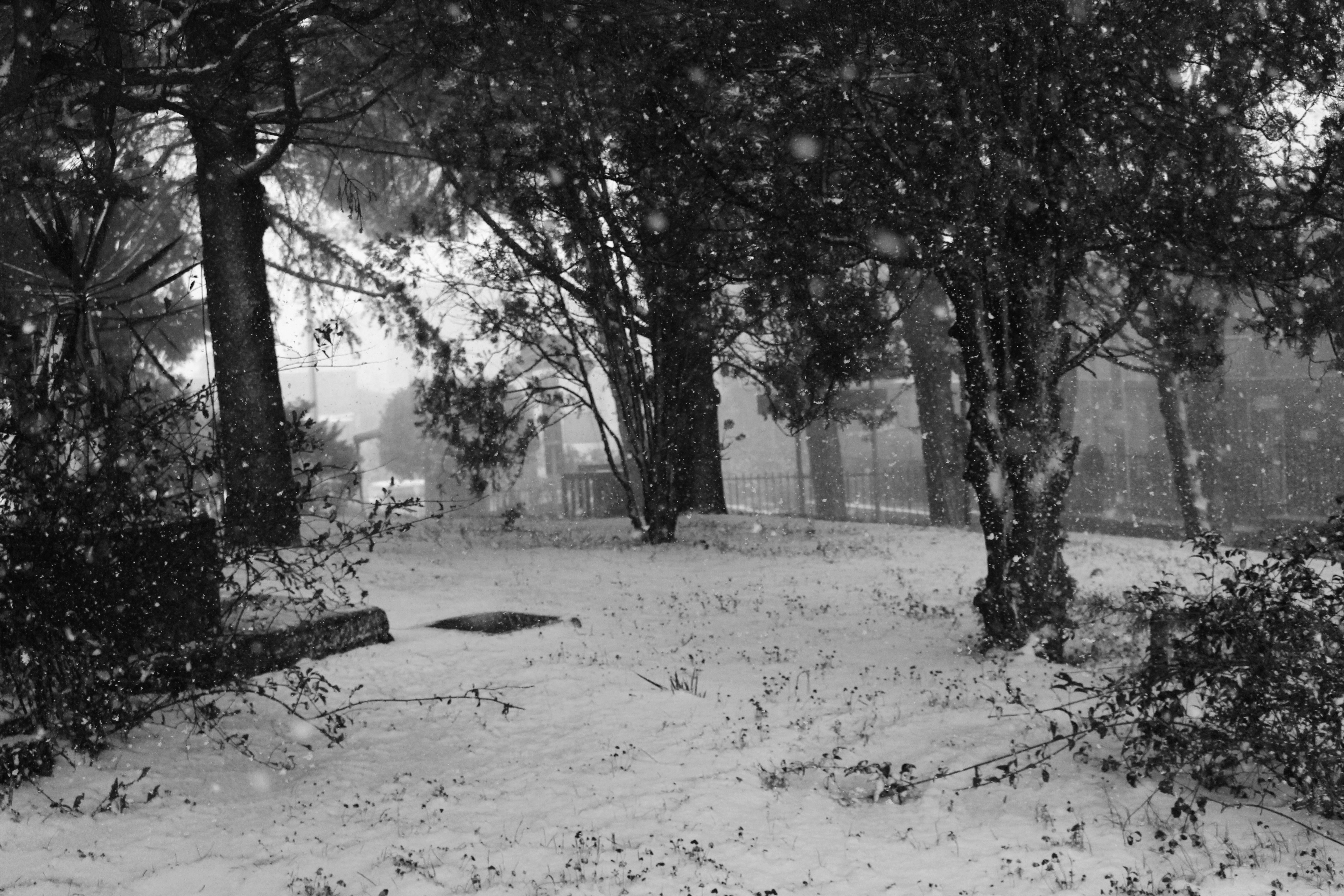 Parco Giardino ricoperto di neve durante la nevicata del 6 e 7 Gennaio 2017